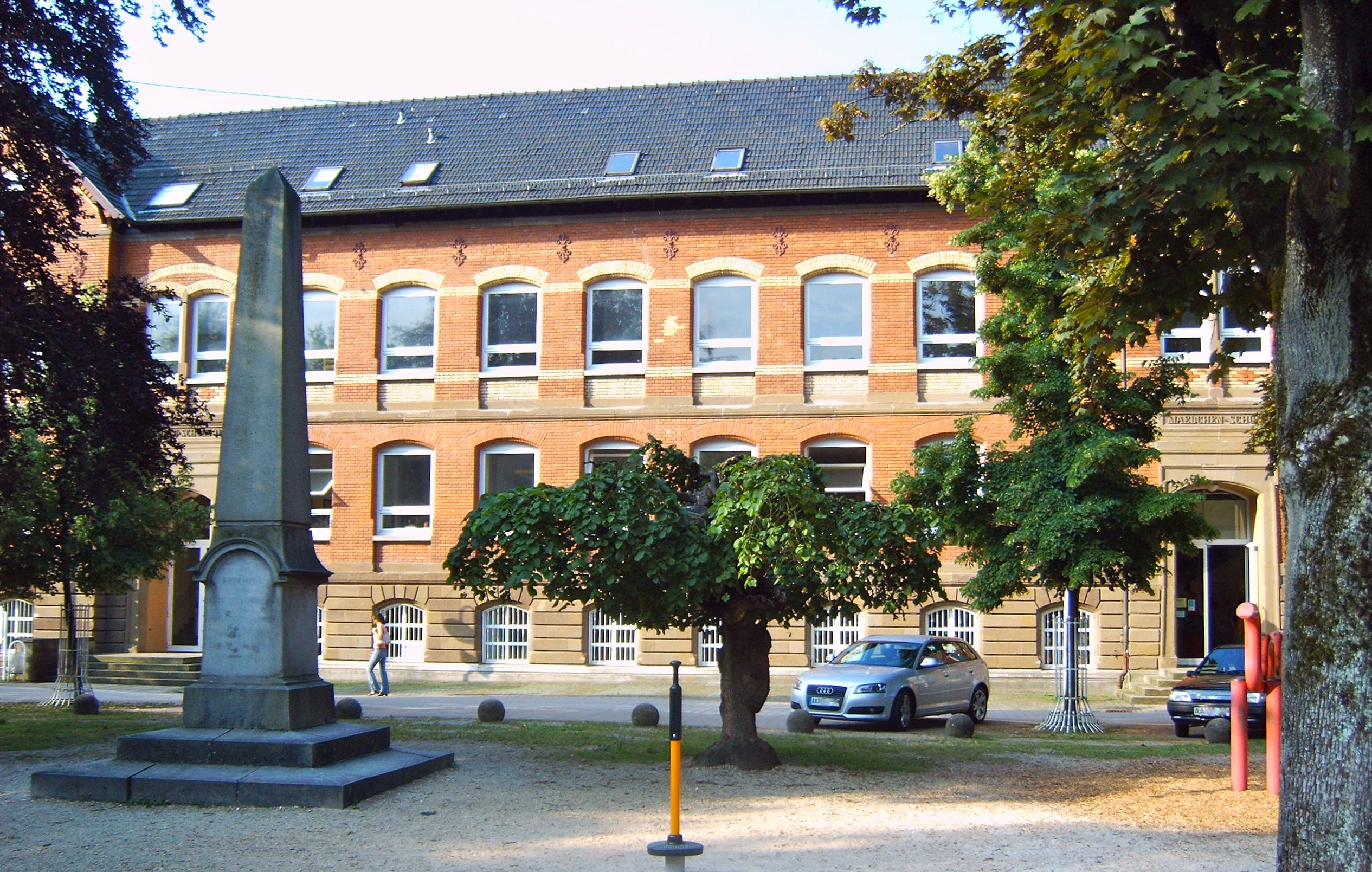 Ehemalige Schillerschule in Lorch, heute als Bürgerhaus und Stadtbücherei genutzt. Im Vordergrund Denkmal an den Deutsch-Französischen Krieg.